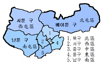 타이중시 행정 구역.